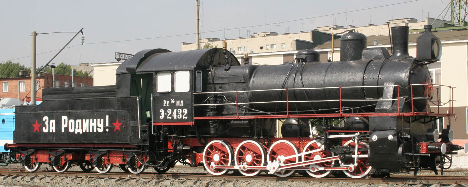 Паровоз Э-2432 в локомотивном депо Саратов (на новом месте, перемещение на новое место начато в 2007 году, но на место паровоз встал лишь в 2008 году).